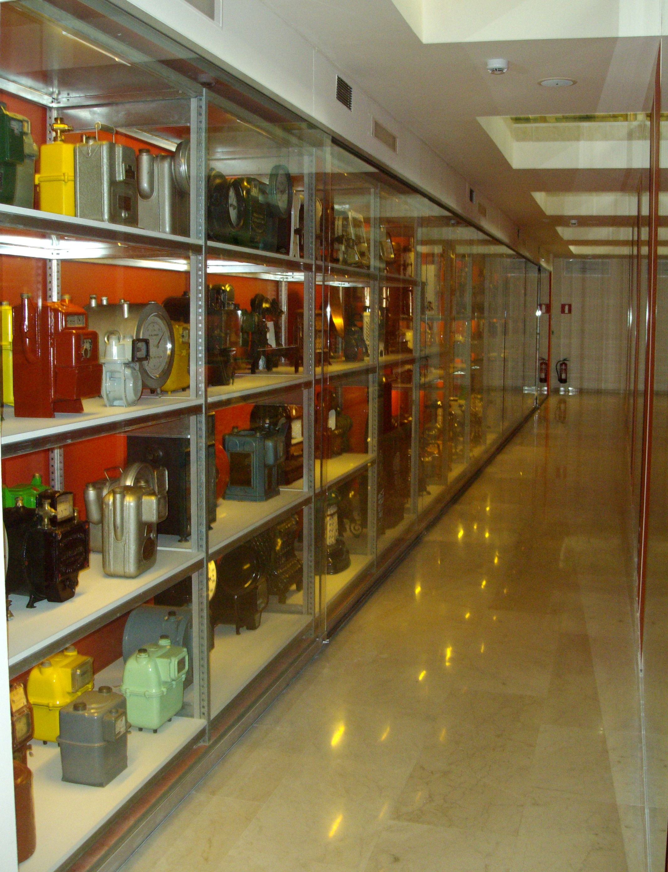 Museo del Gas. Colección Catalana de Gas, ubicada en la planta -1 del museo.